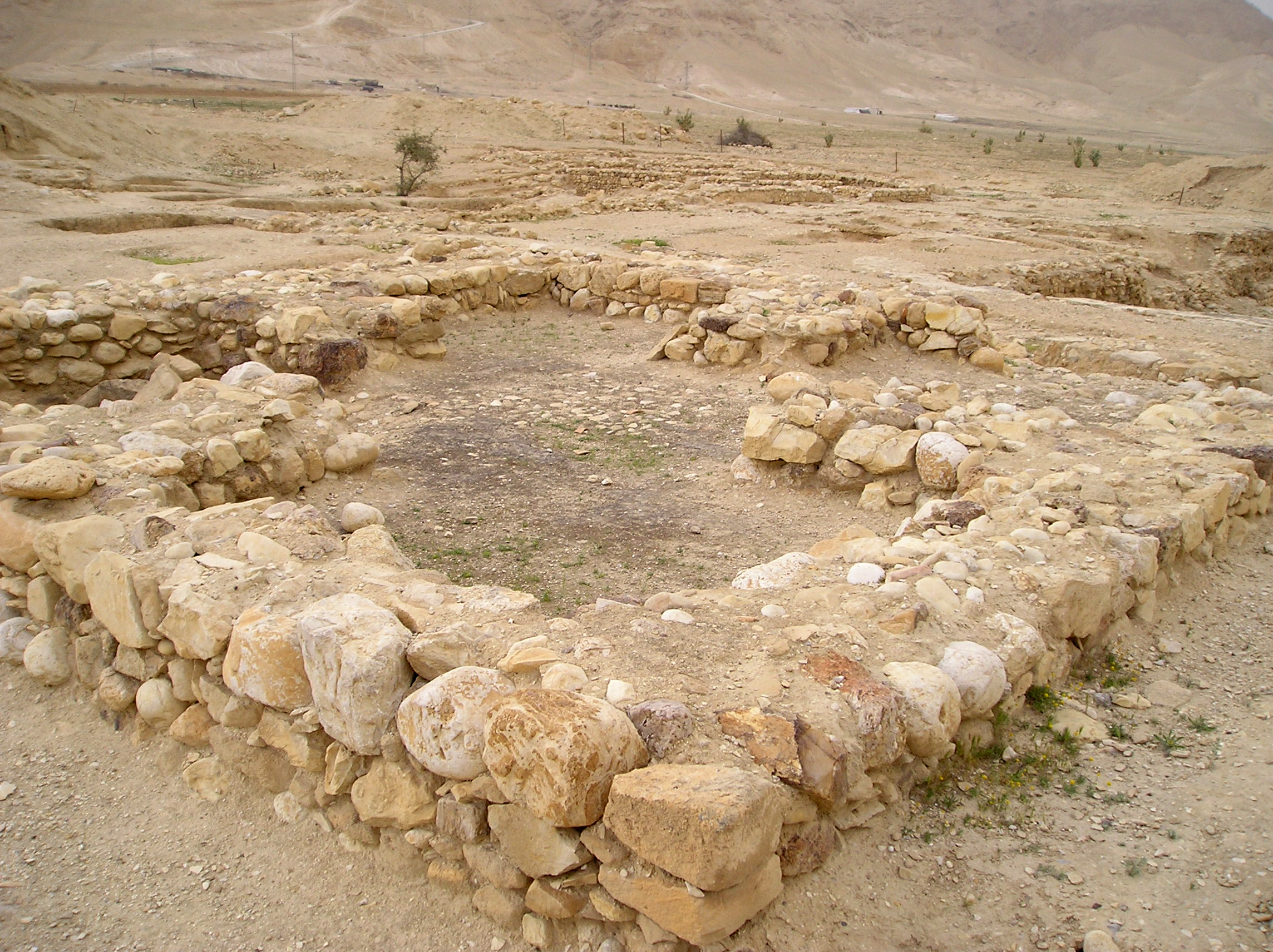 Pozostałości antycznego Columbarium (gołębnik). Strefa wykopalisk na Tulul Abu el-Alayiq. Jerycho z czasów Hasmoneuszy i Heroda Wielkiego (od II w. przed Chr. do I w. po Chr.). Prace prowadzili: C. Warren - 1868, E. Sellin, C. Watzinger - 1909 e 1911, J. Kelso, D. Baramki, J. Pritchard - 1950-1951, G. Foerster e E. Netzer - 1973-1983 oraz 1986-1988. Badania trwają po dziś dzień. Zdjęcie wykonał A. Sobkowski dn. 9 marca 2006.